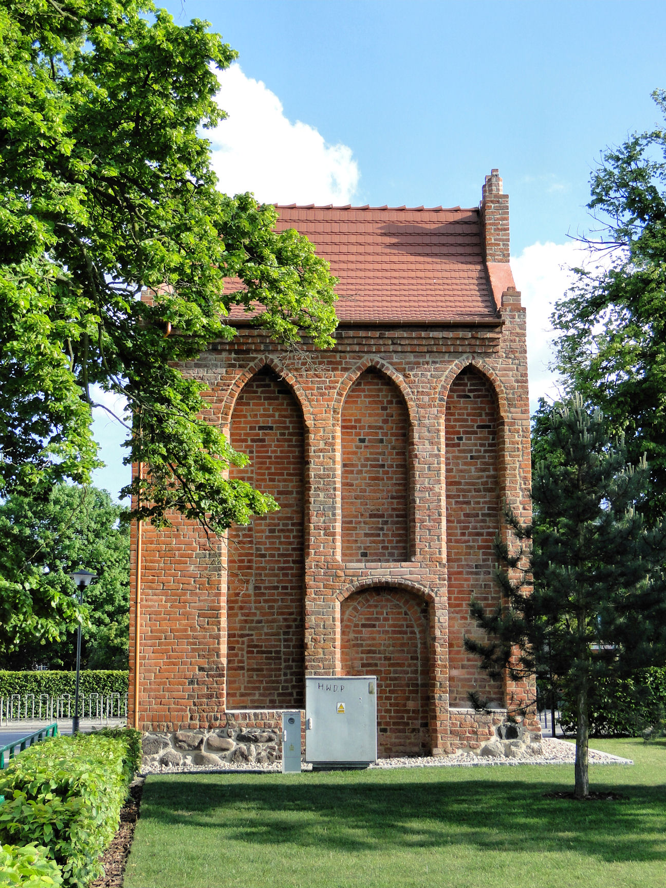 Kaplica gotycka w Policach - elewacja północna